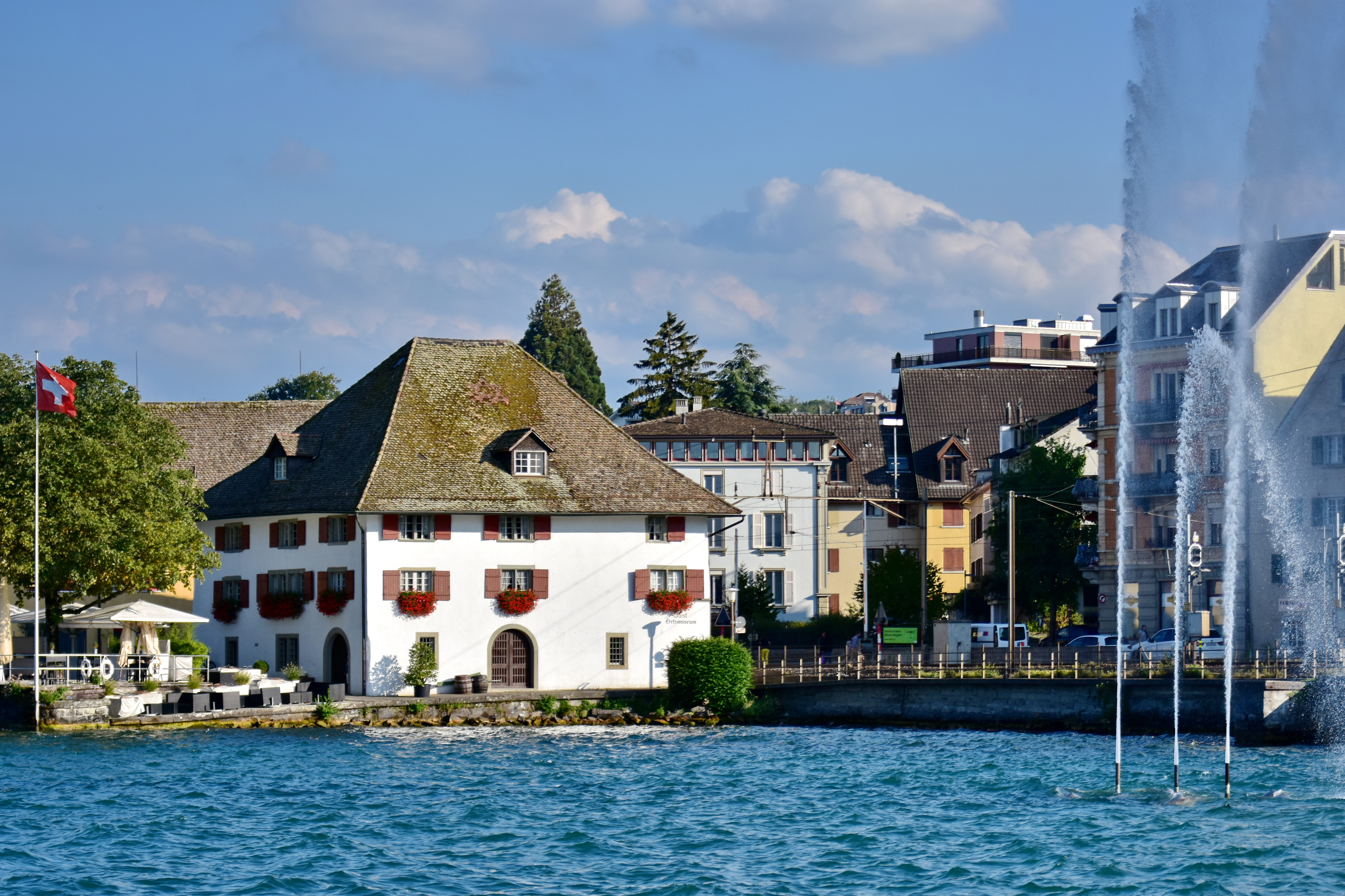 Horgen on Zimmerberg, as seen from ZSG ship MS Helvetia on Zürichsee in Switzerland